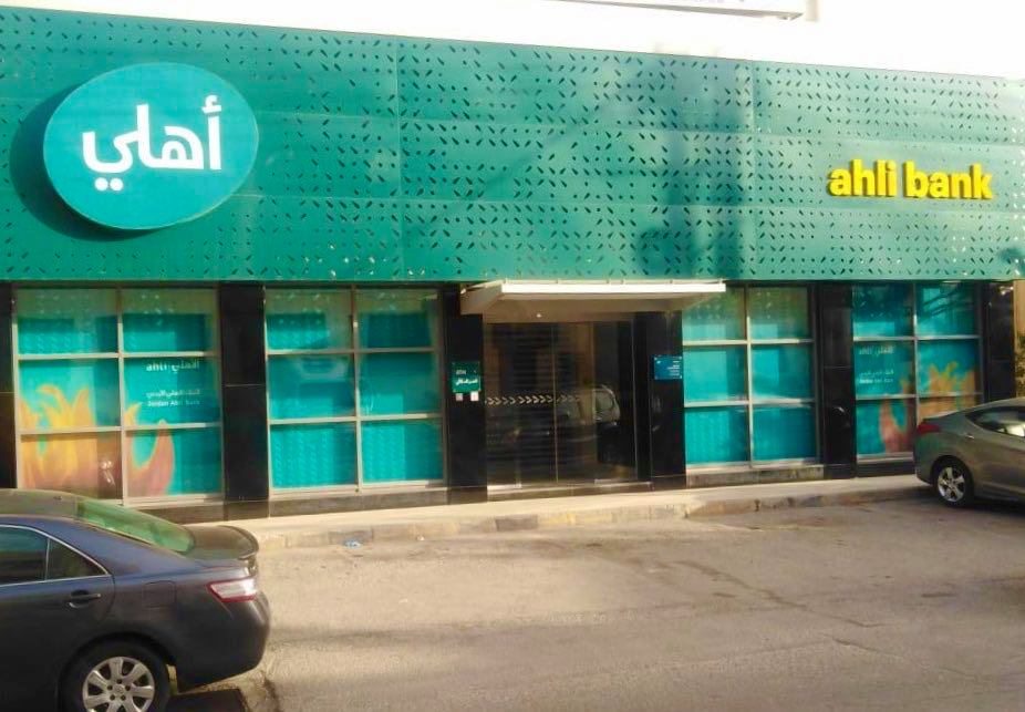 صورة لواجهة أحد فروع البنك الأهلي الأردني في العاصمة عمان- الأردن